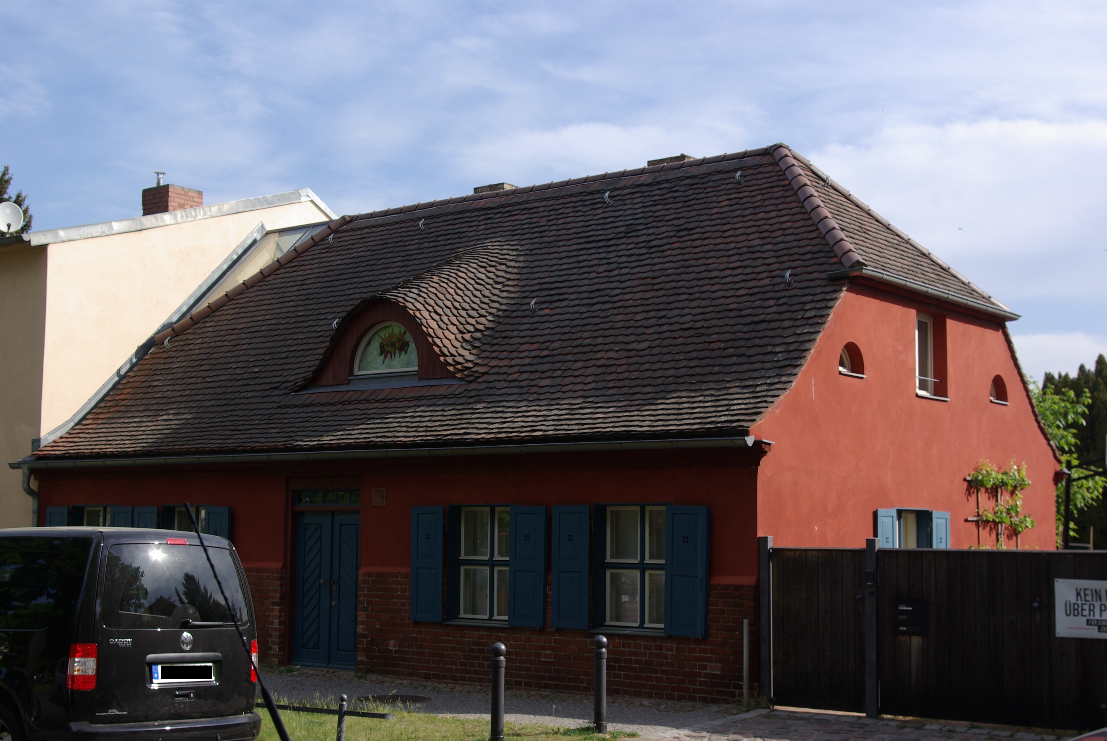 Potsdam in Brandenburg. Das Haus Weberplatz 3 in Babelsberg steht unter Denkmalschutz.